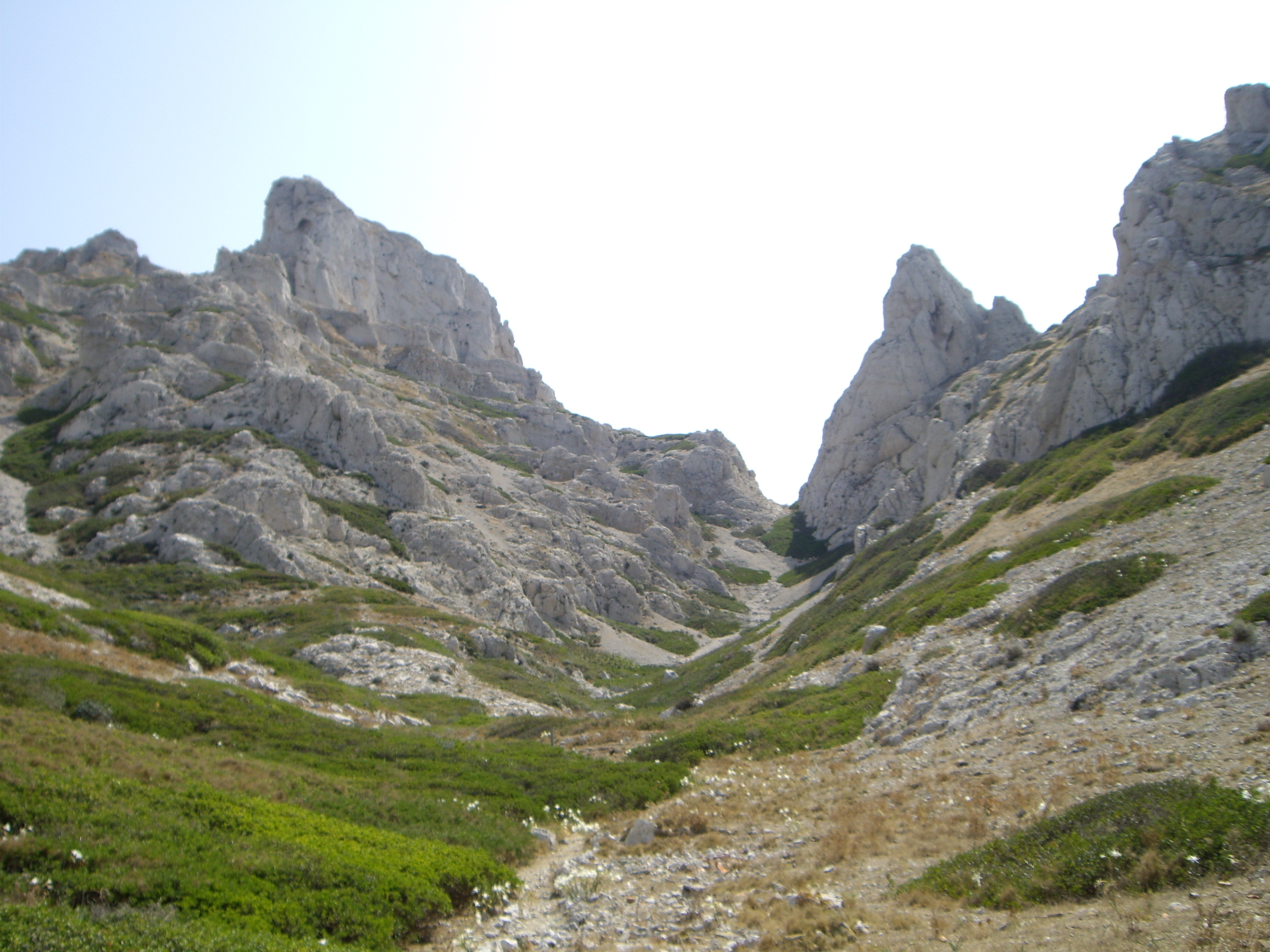 Col de la Culatte, sur l'île de Riou, France.